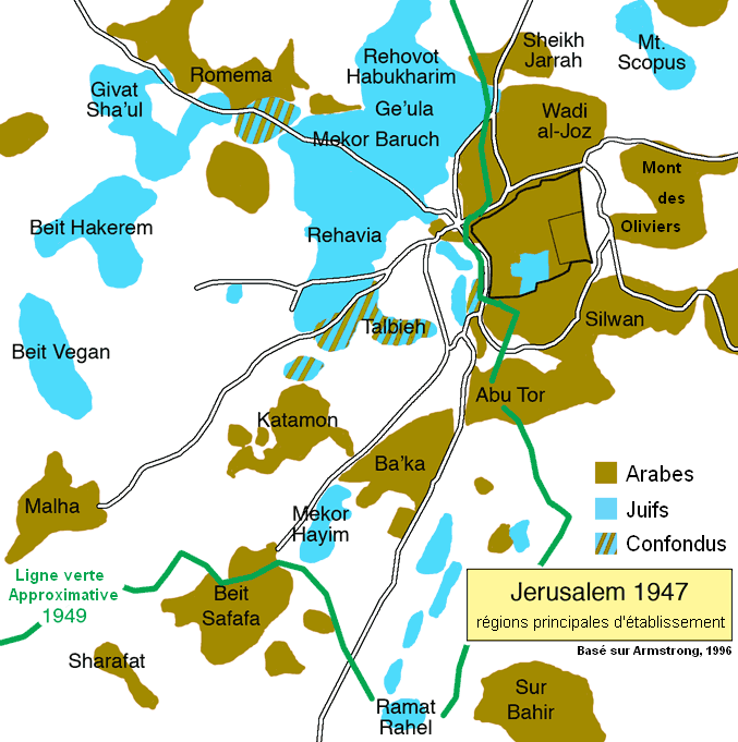 Traduction de la carte Image:Jerusalem1947.png Auteur: Rogilbert 14:33, 2 November 2006 (UTC)